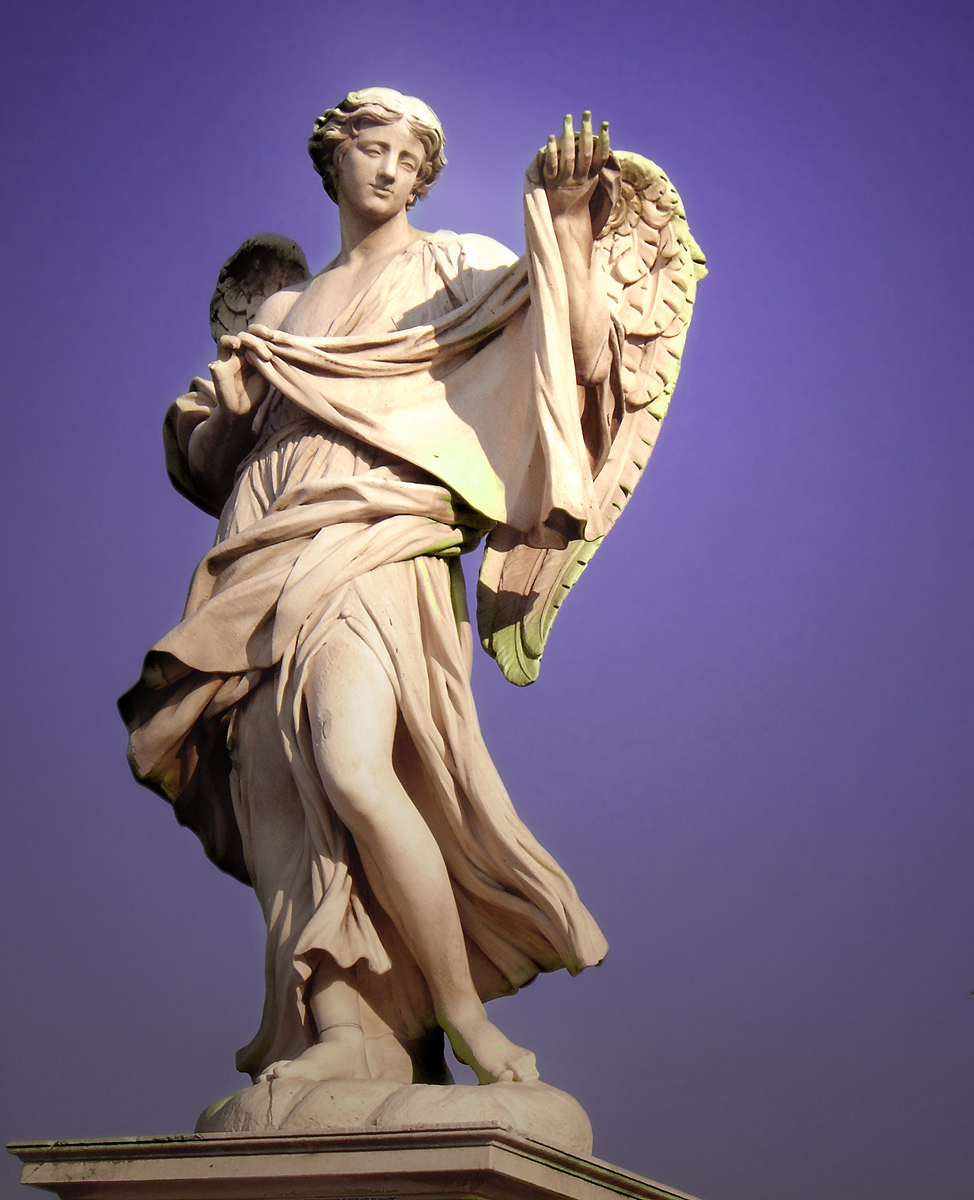 Respice faciem Christi tui o "con il Volto Santo". Cosimo Fancelli, Ponte SantAngelo, Rome.